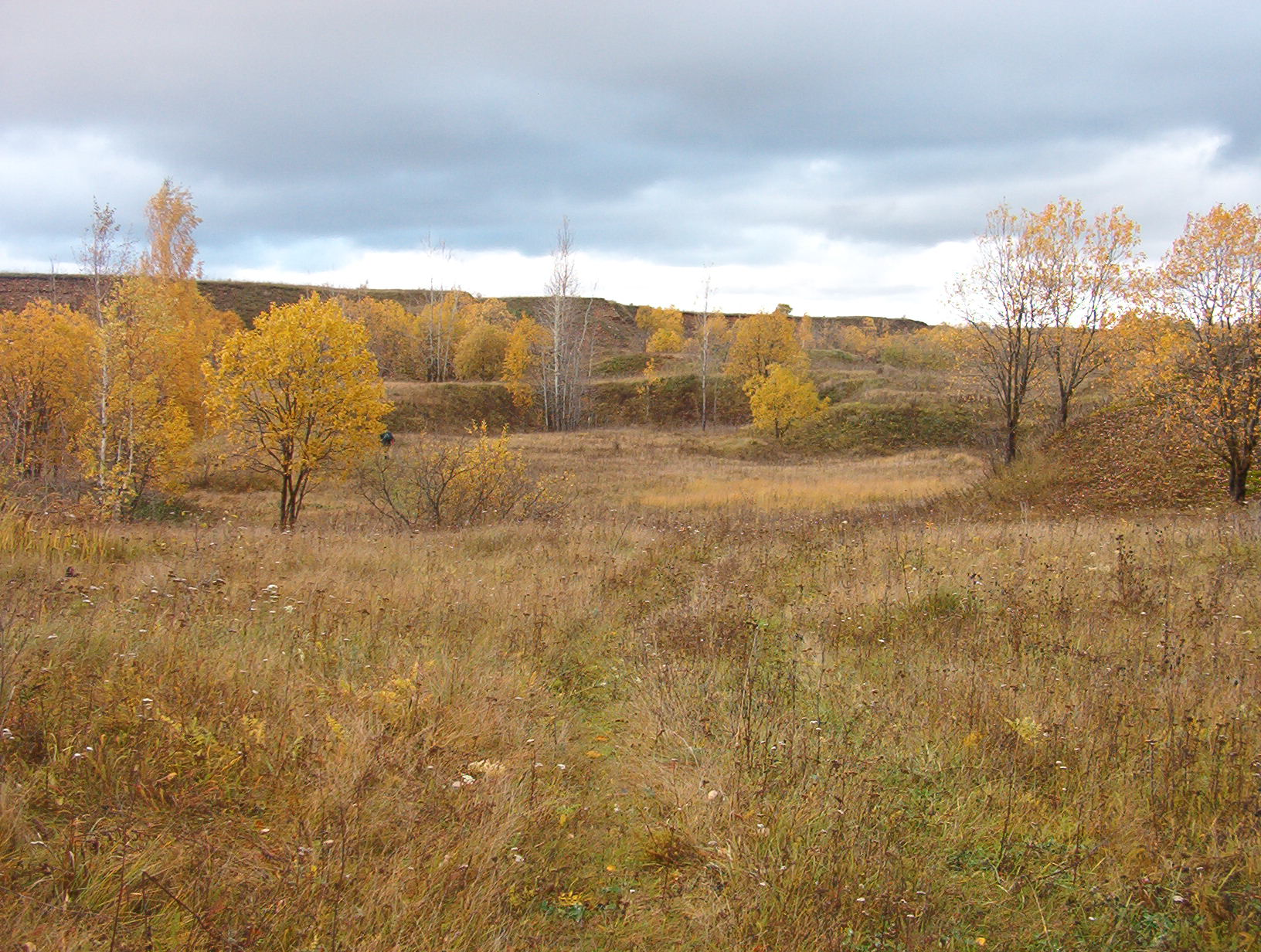 Kunda hiiemägi